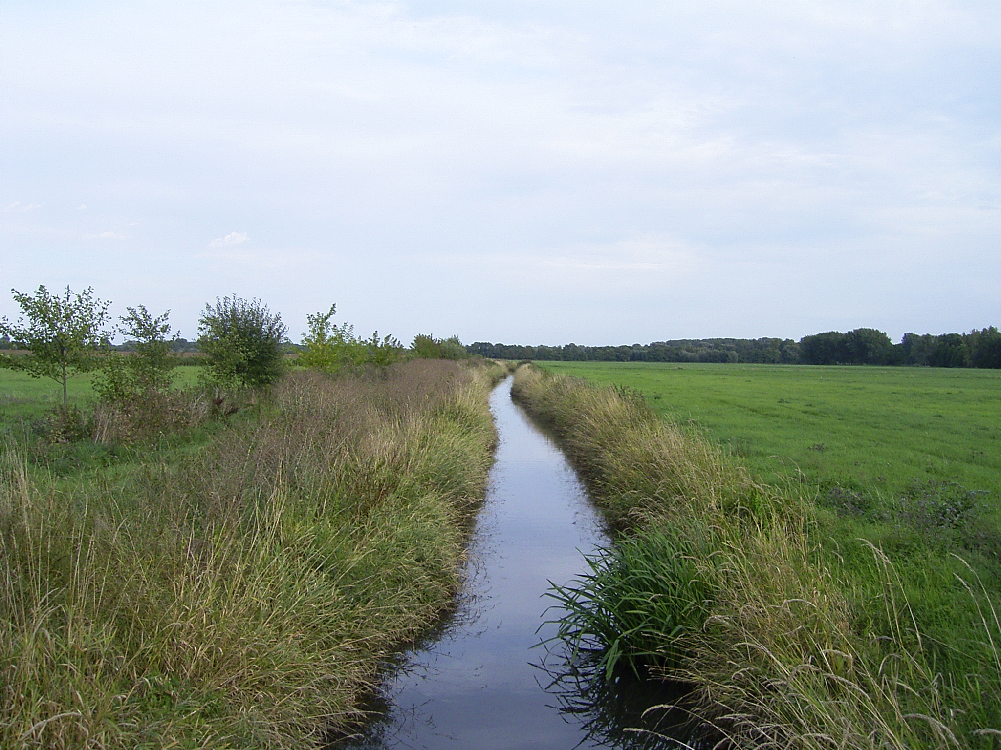 Die Fuhneaue zwischen Schortewitz und Mösthinsdorf. Hier verläuft die Fuhne als Grenze zwischen dem Landkreis Köthen und dem Saalkreis.